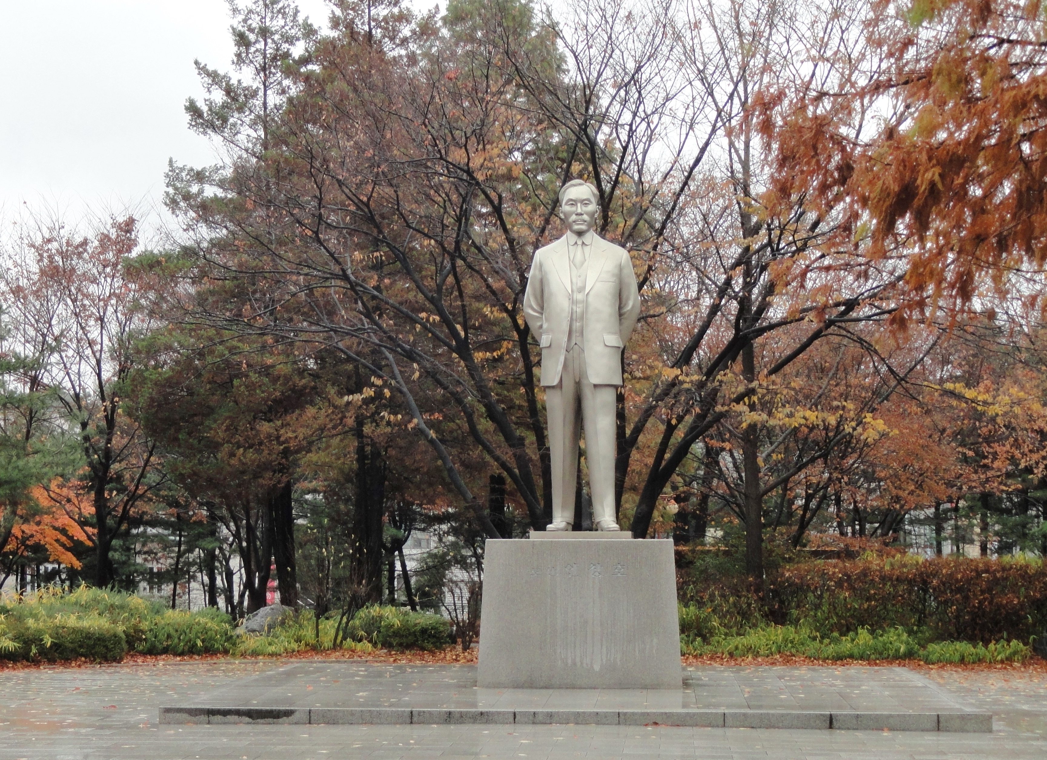 Dosan Memorial Park in Gangnam-gu, Seoul, South Korea.